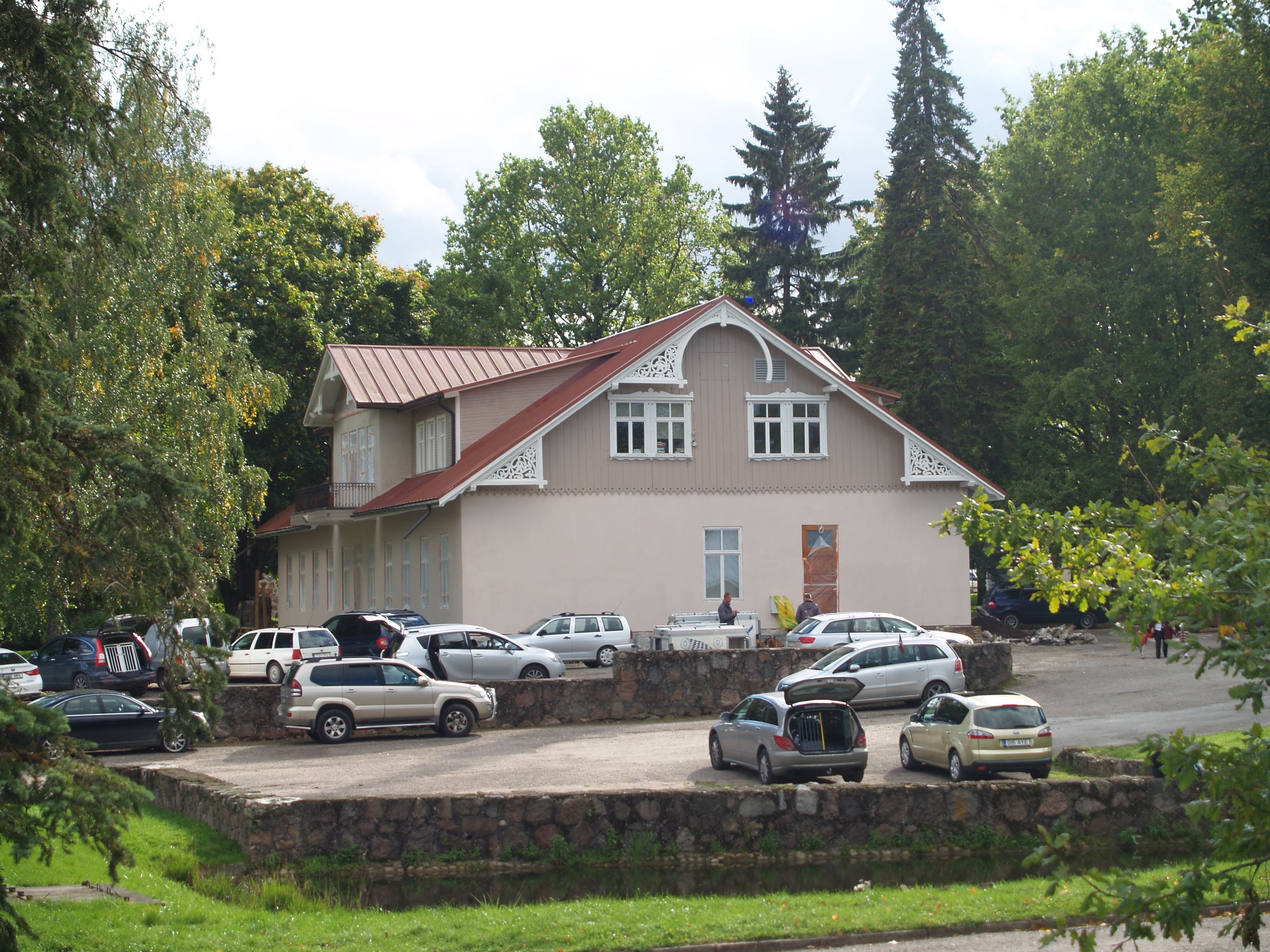 Eesti Põllumajandusmuuseumi administratiivhoone: endine Ülenurme mõisa peahoone.